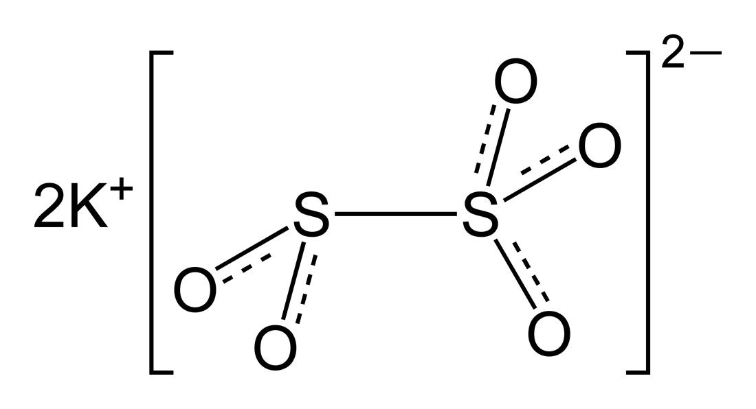 Structural formula of potassium metabisulfite